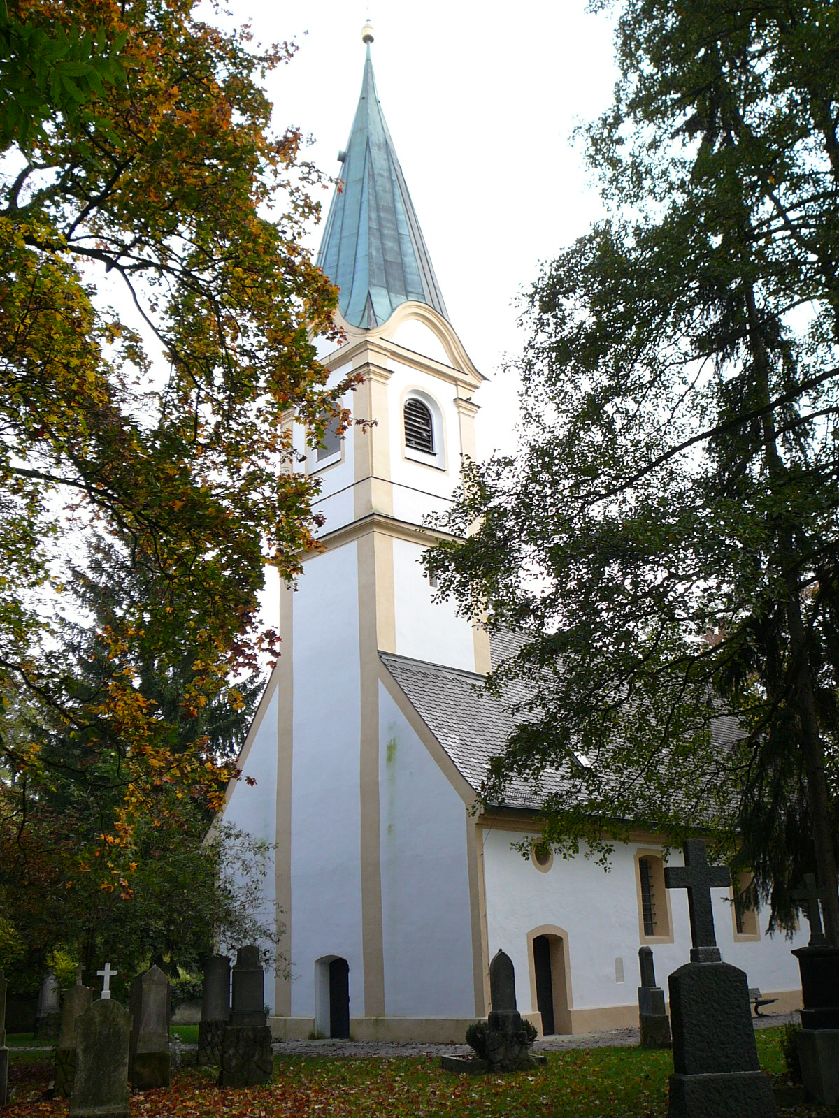 Kirche St. Georg in Steinkirchen/Planegg